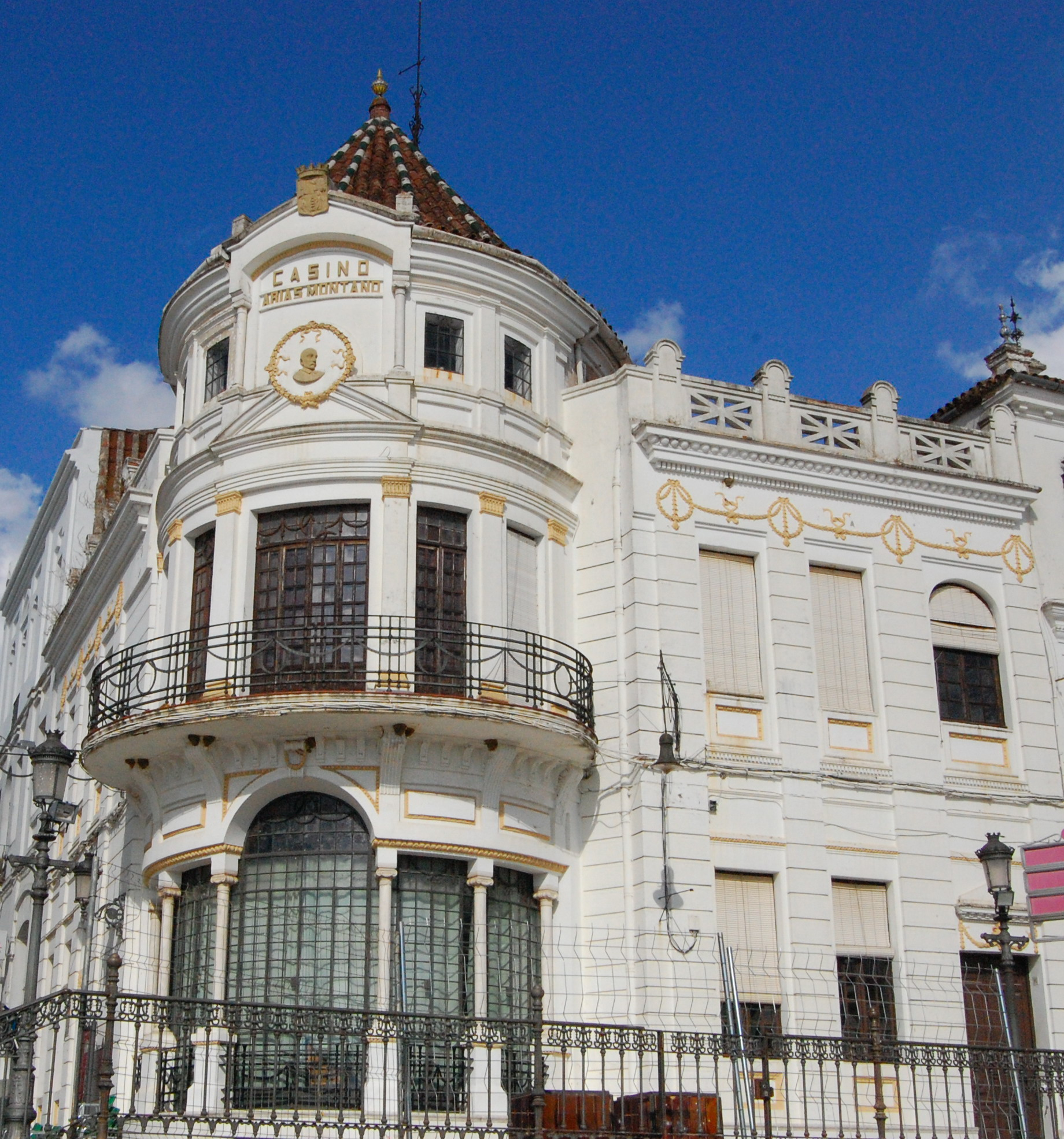 Casino de Arias Montano en Aracena